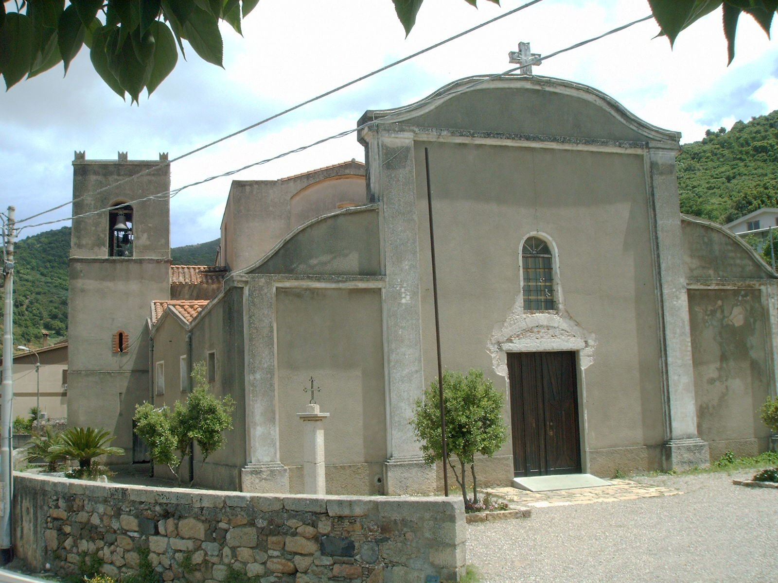 chiesa s.Barbara Gonnosfanadiga